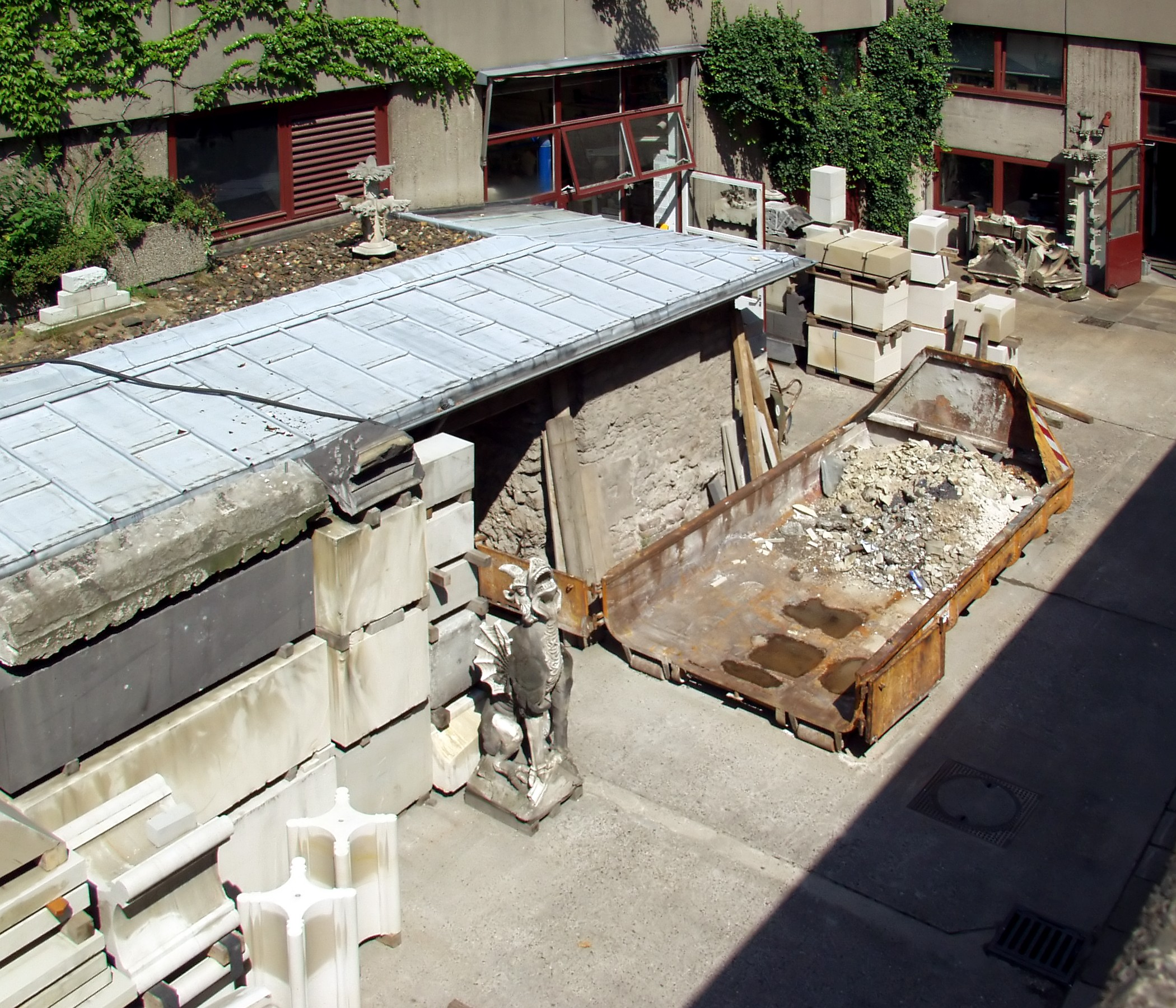 Innenhof der Dombauhütte des Kölner Domes